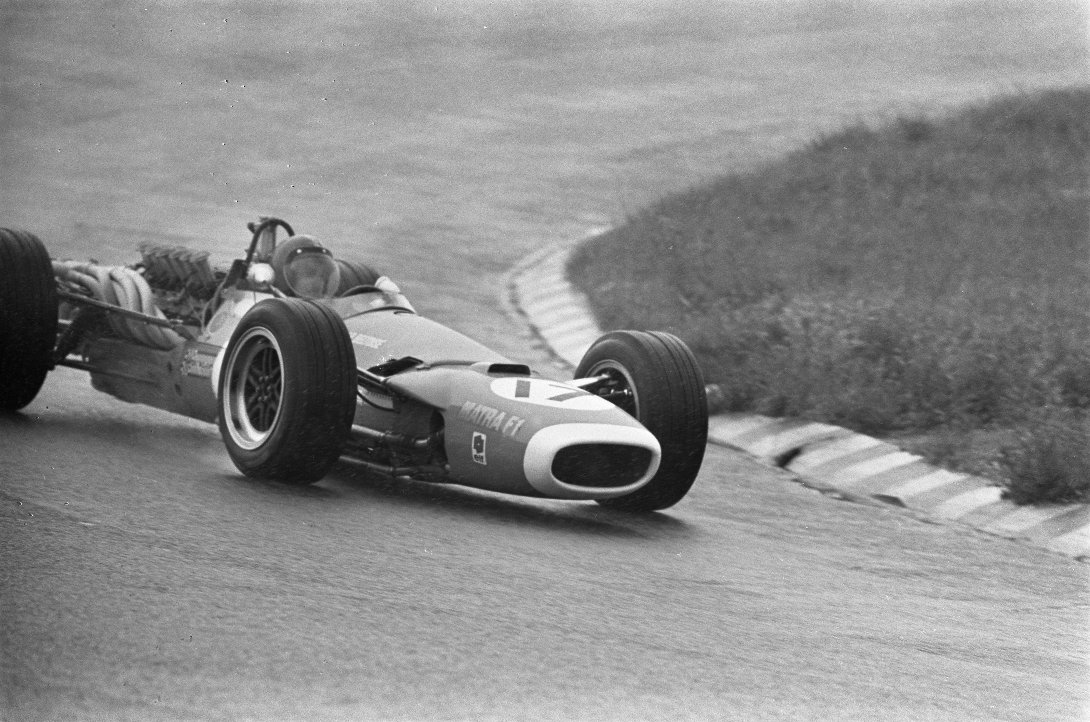 Collectie / Archief : Fotocollectie Anefo Reportage / Serie : [ onbekend ] Beschrijving : Grand Prix 68 Zandvoort . Jean-Marie Beltoise (Matra-Ford) Datum : 23 juni 1968 Locatie : Zandvoort Trefwoorden : autosport Persoonsnaam : Beltoise, Jean-Pierre Fotograaf : Evers, Joost / Anefo Auteursrechthebbende : Nationaal Archief Materiaalsoort : Negatief (zwart/wit) Nummer archiefinventaris : bekijk toegang 2.24.01.05 Bestanddeelnummer : 921-4609